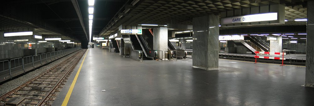 Panoramafoto van het Brusselse Noordstation.